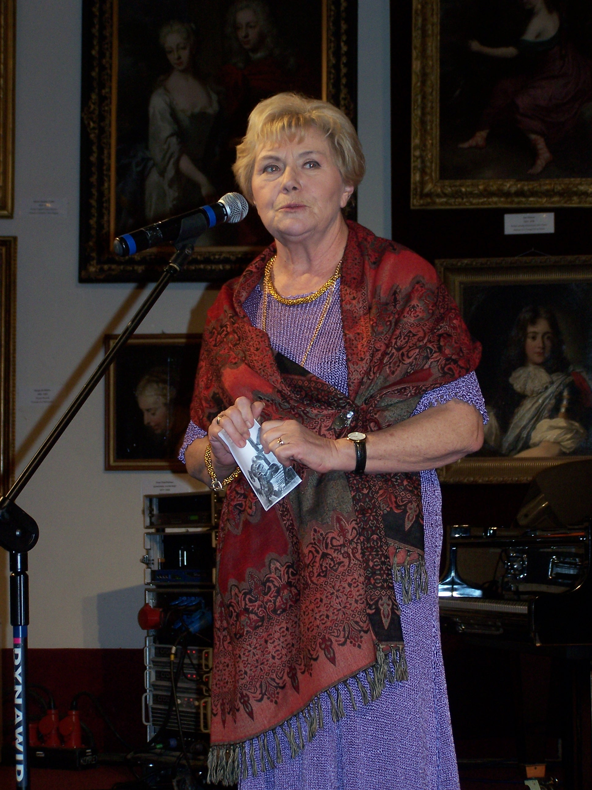 Teresa Lipowska na uroczystości wręczenia nagród w konkursie "Kwiaty dla Babci i Dziadka", Galeria Porczyńskich, Warszawa